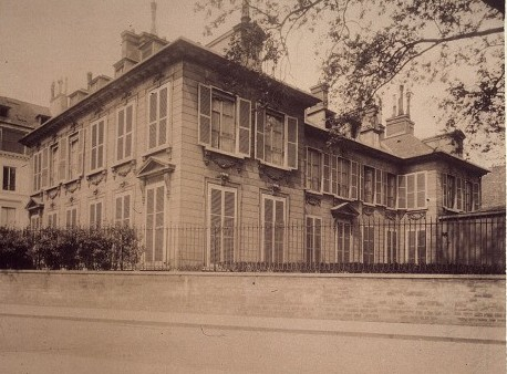 Hôtel Thiroux de Montsauge (plus tard hôtel de Massa), angle de l'avenue des Champs Elysées et de la rue La Boétie, Paris (transféré en 1929 rue du Faubourg Saint-Jacques). Hôtel construit en 1777 par Jean-Baptiste Le Boursier pour le financier Thiroux de Montsauge, fermier des Postes.